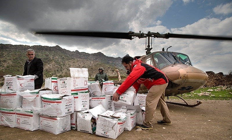 سیل ۱۳۹۸ لرستان